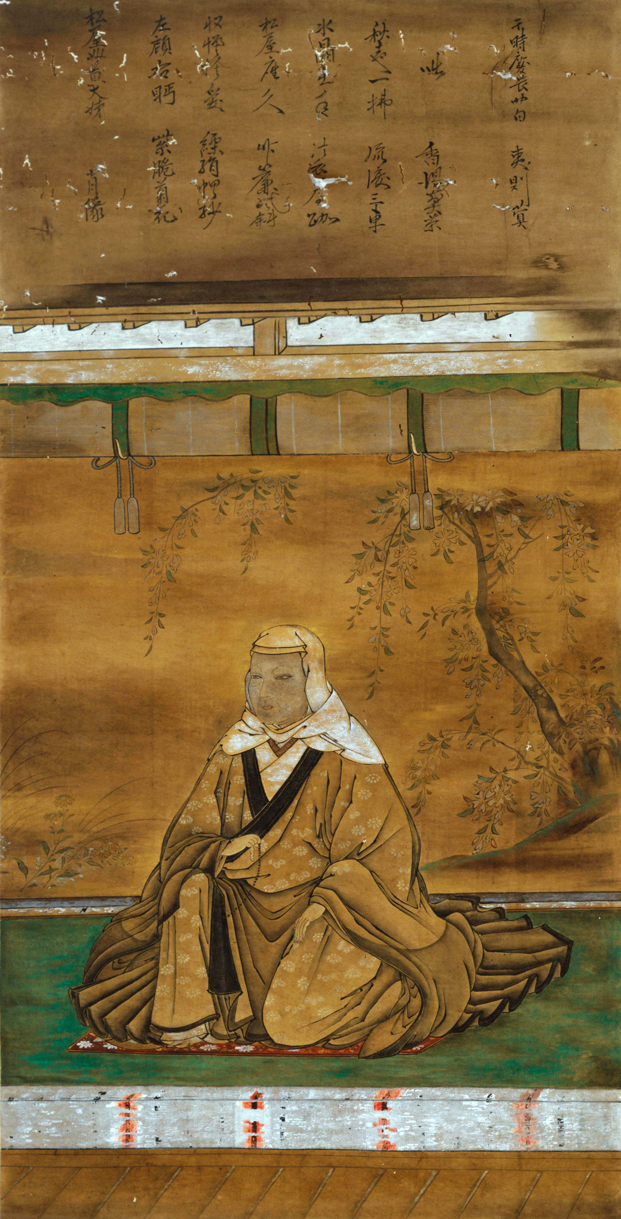 朝日局（杉原助左衛門室）、高台院母。京都府高台寺所蔵。